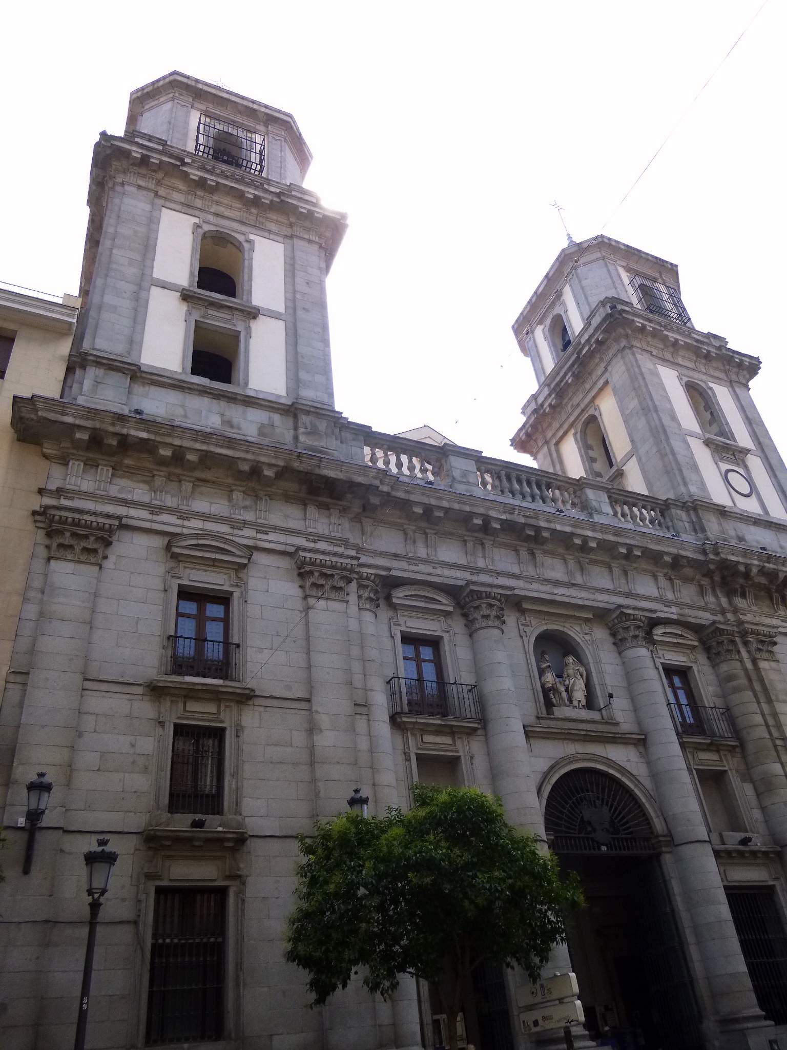 Colegiata San Isidro (Madrid)